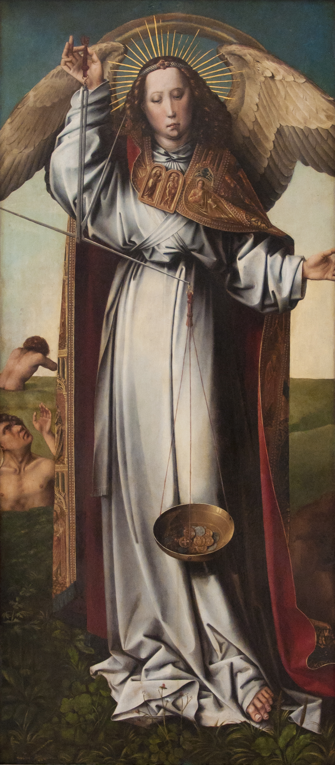 Fragment van een retabel "Het Laatste Oordeel" met de aartsengel Michaël voor een kerk in Keulen